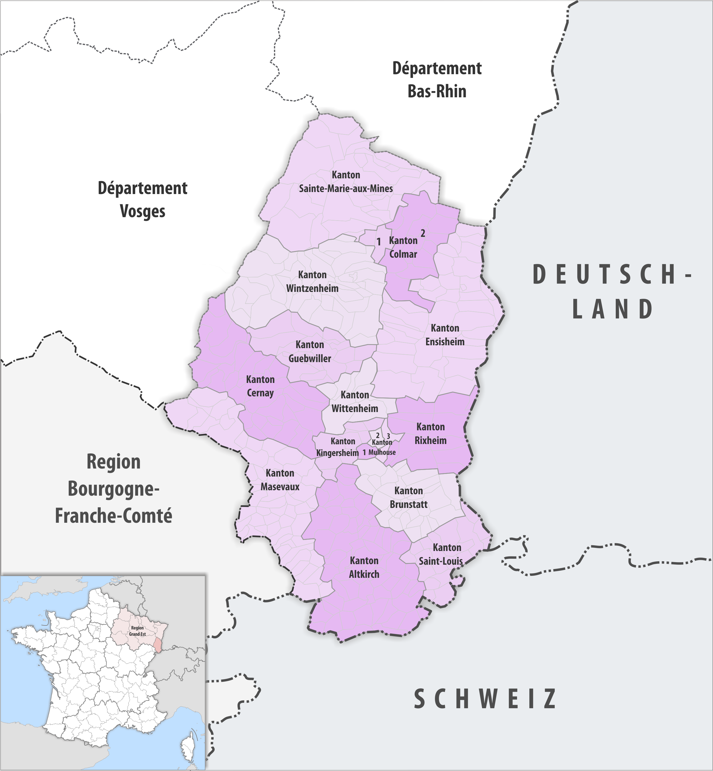 Gemeinden und Kantone im Departement Haut-Rhin